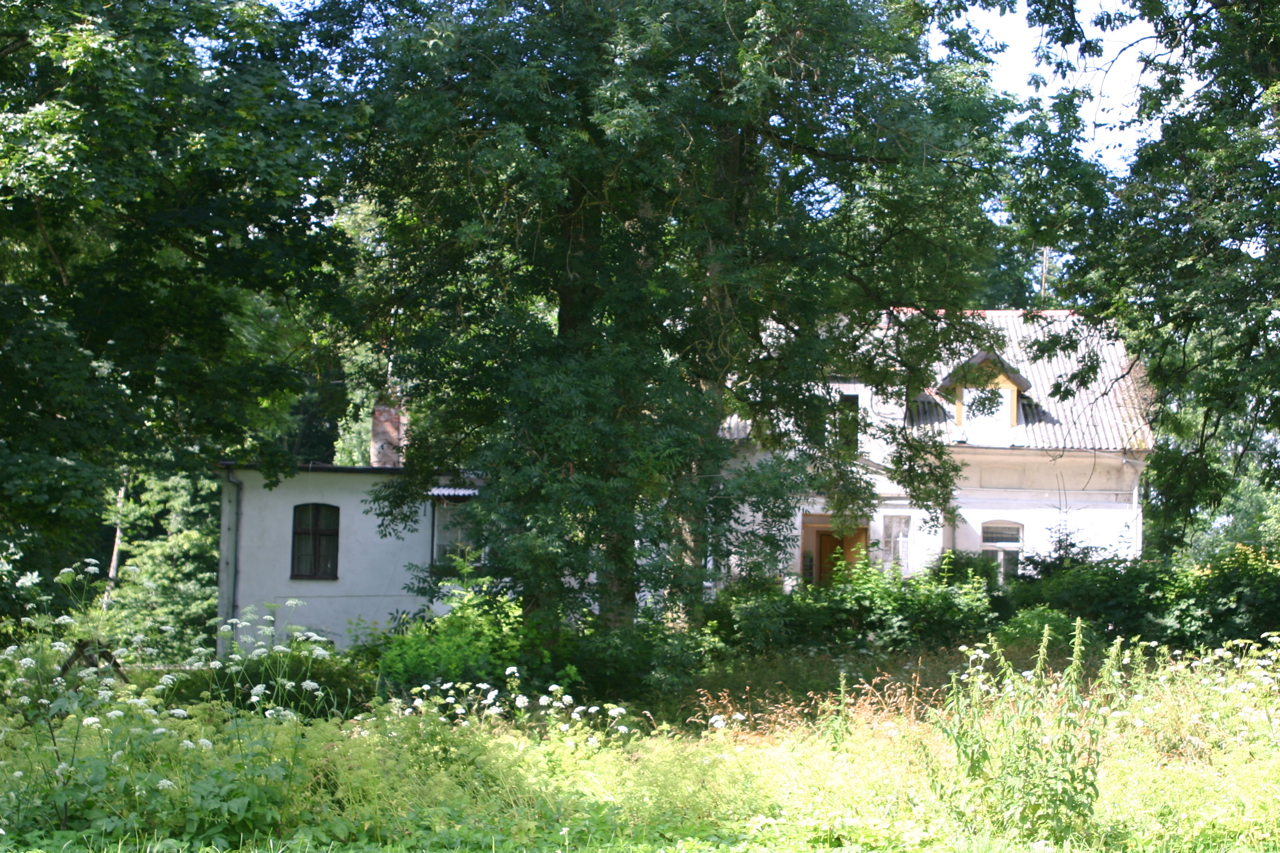 Parcz